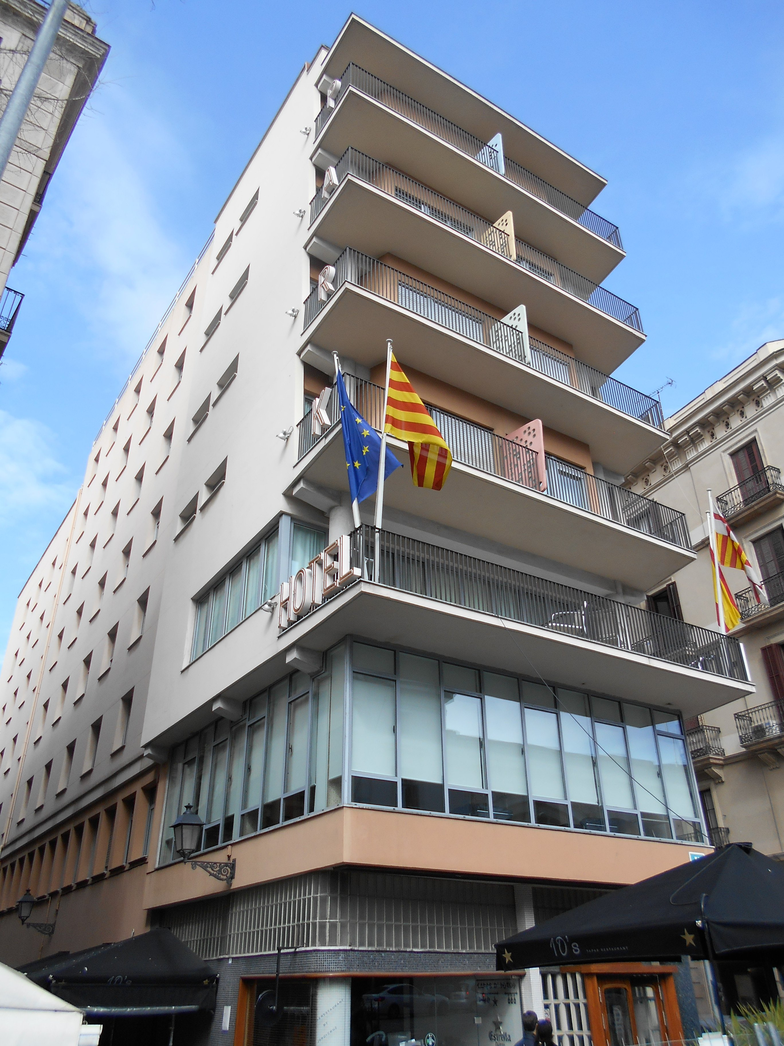 Hotel Park (Barcelona).